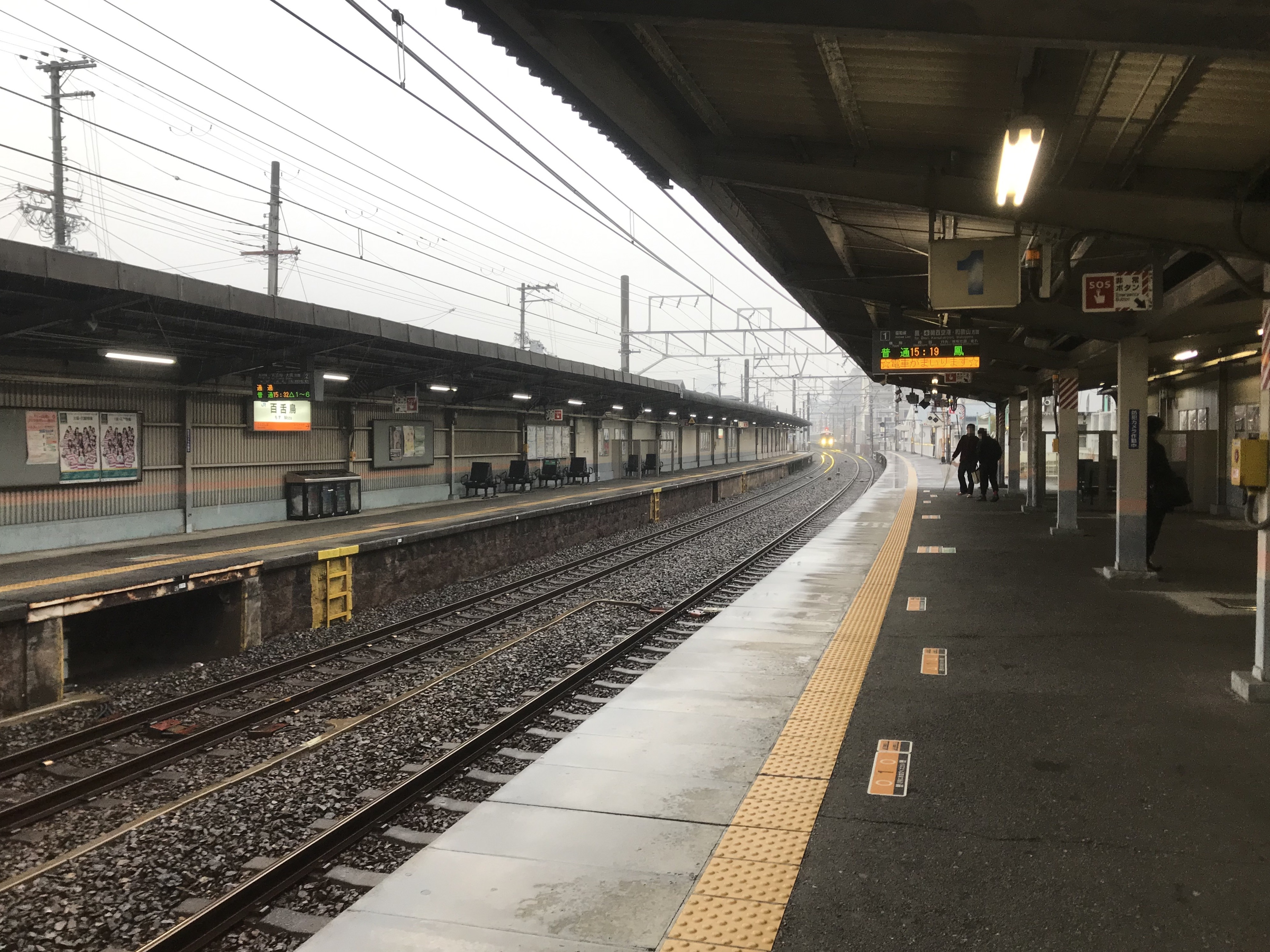 百舌鳥駅のホーム(奥は三国ヶ丘方面)